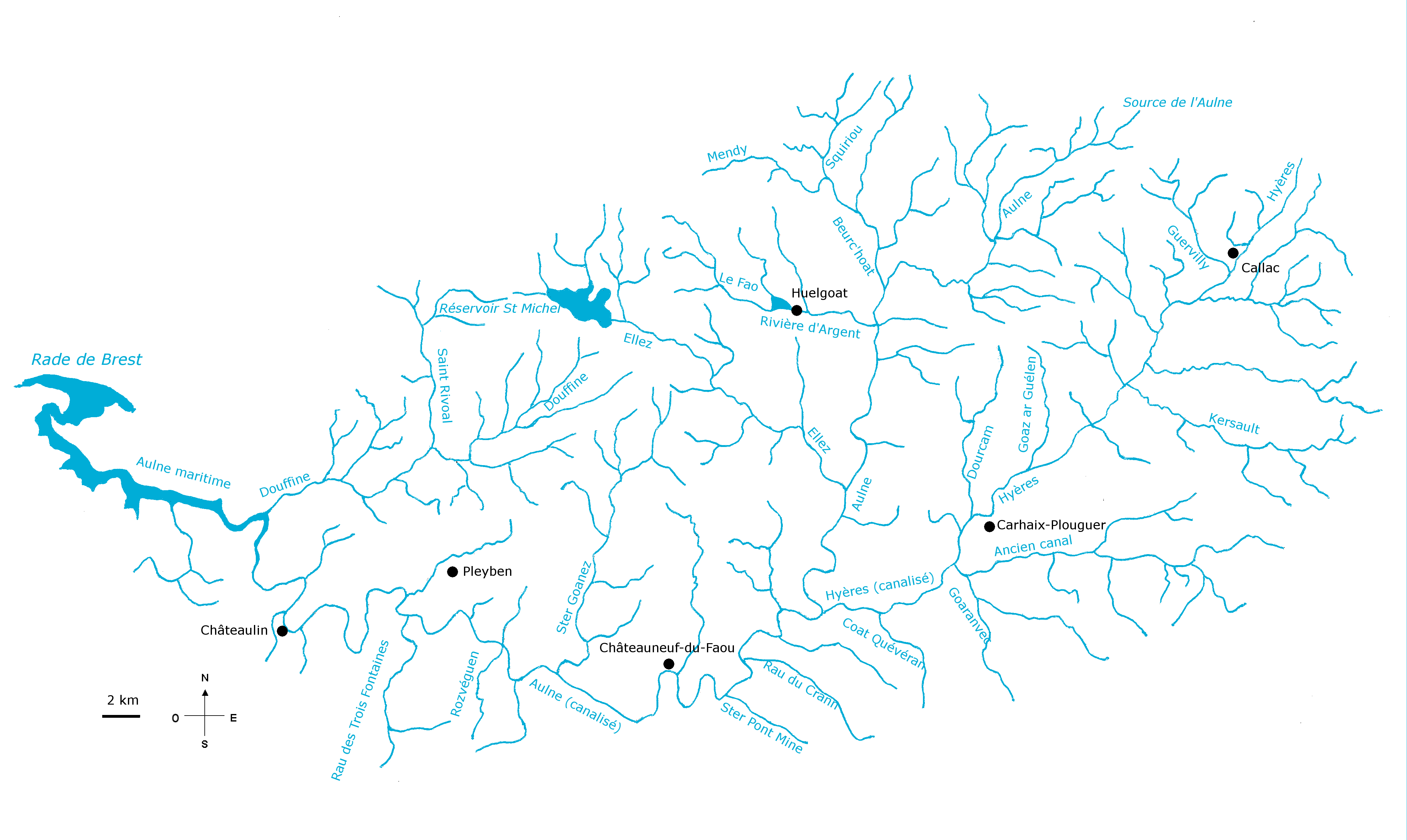 carte hydrographique de l'Aulne (fleuve breton) et de ses principaux affluents.